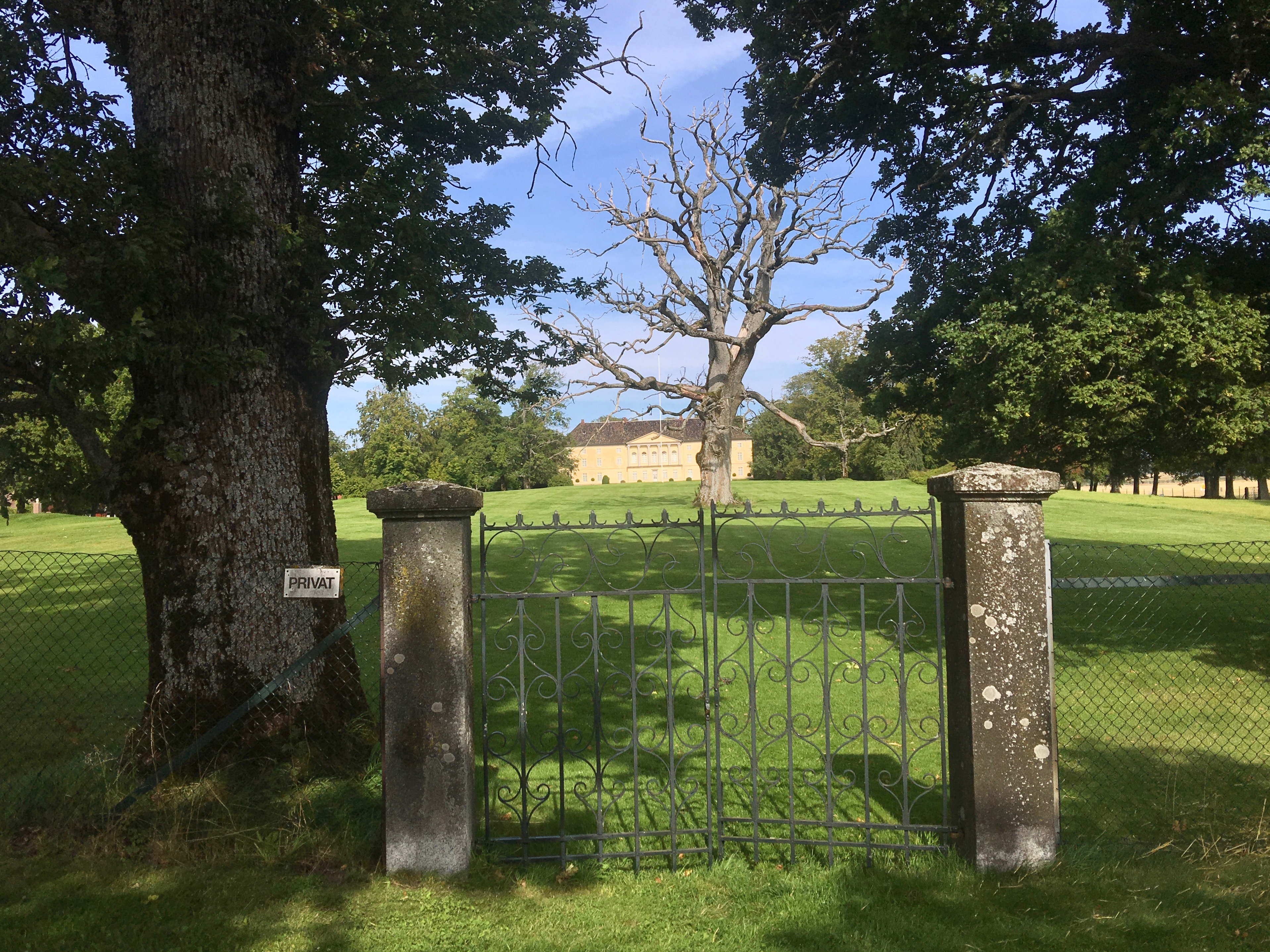 Hovedbygningen ved Jarlsberg Hovedgård utenfor Tønsberg, sett fra sør.